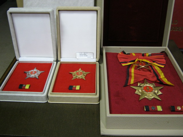 友好星勲章 銀金大綬